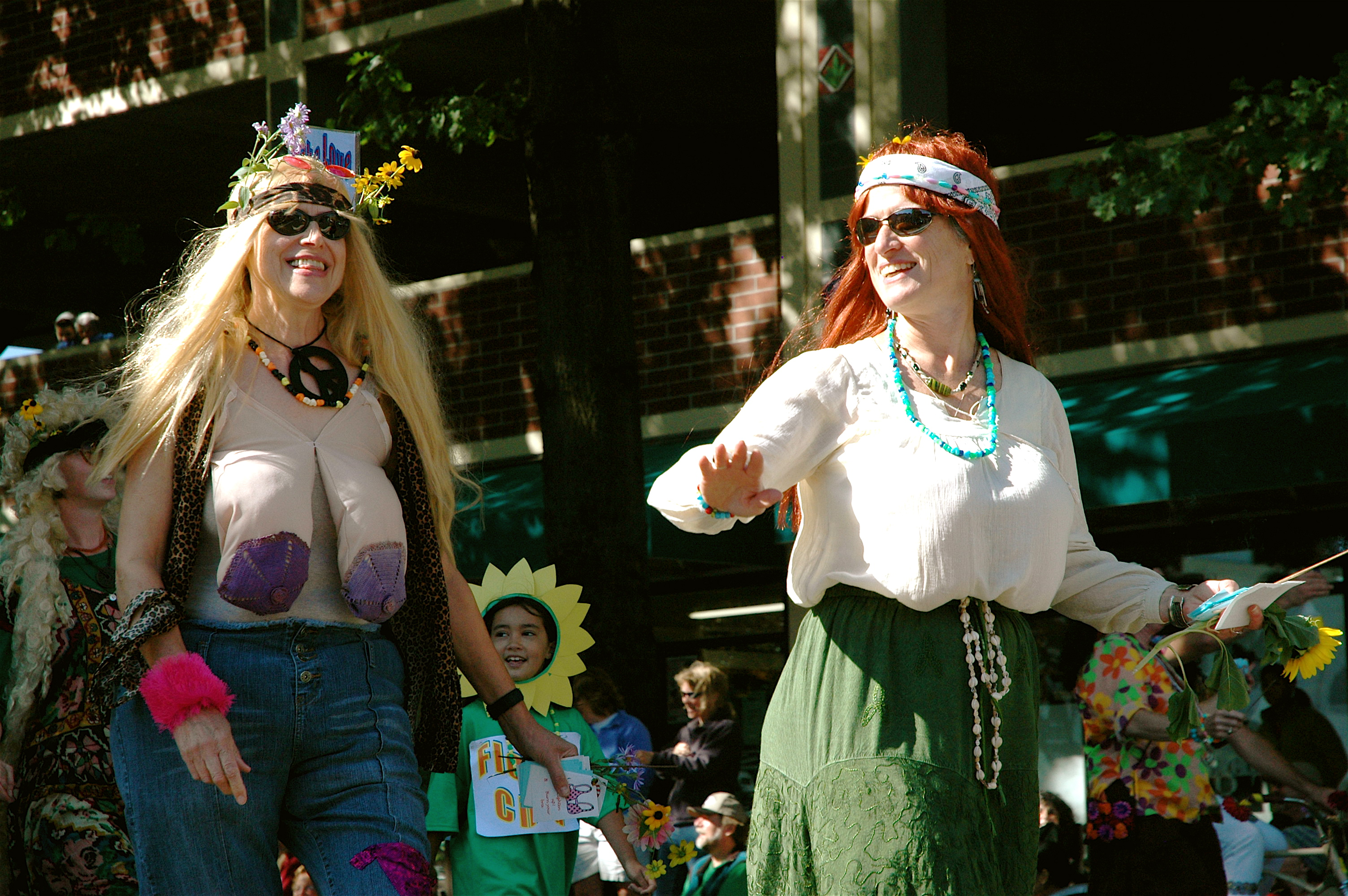 Eugene Celebration attendees